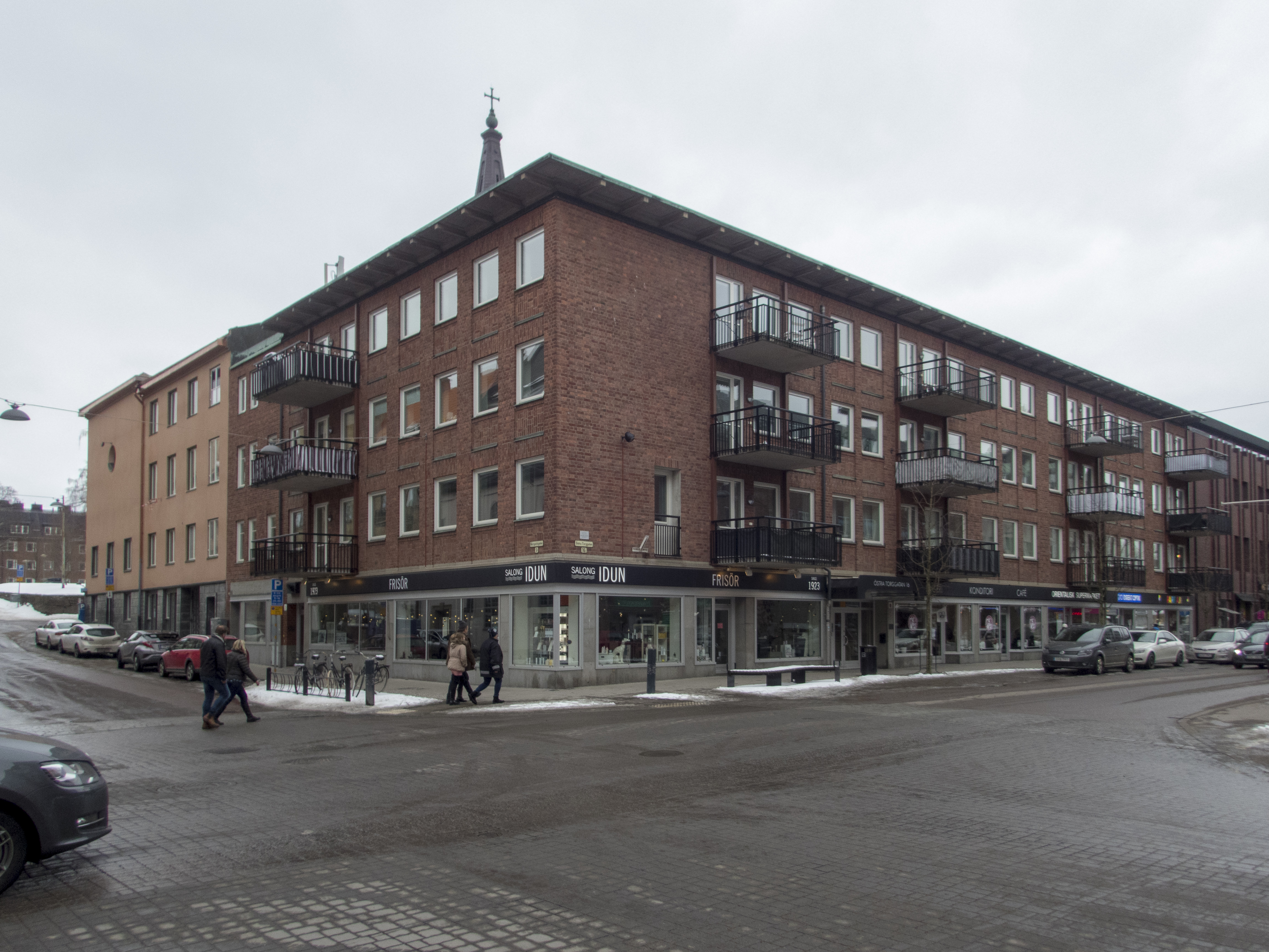 Väktaren 2, Östra Torggatan 16, Herrgårdsgatan 9 Karlstad. Byggnadsår 1955. Arkitekt Folke Björck